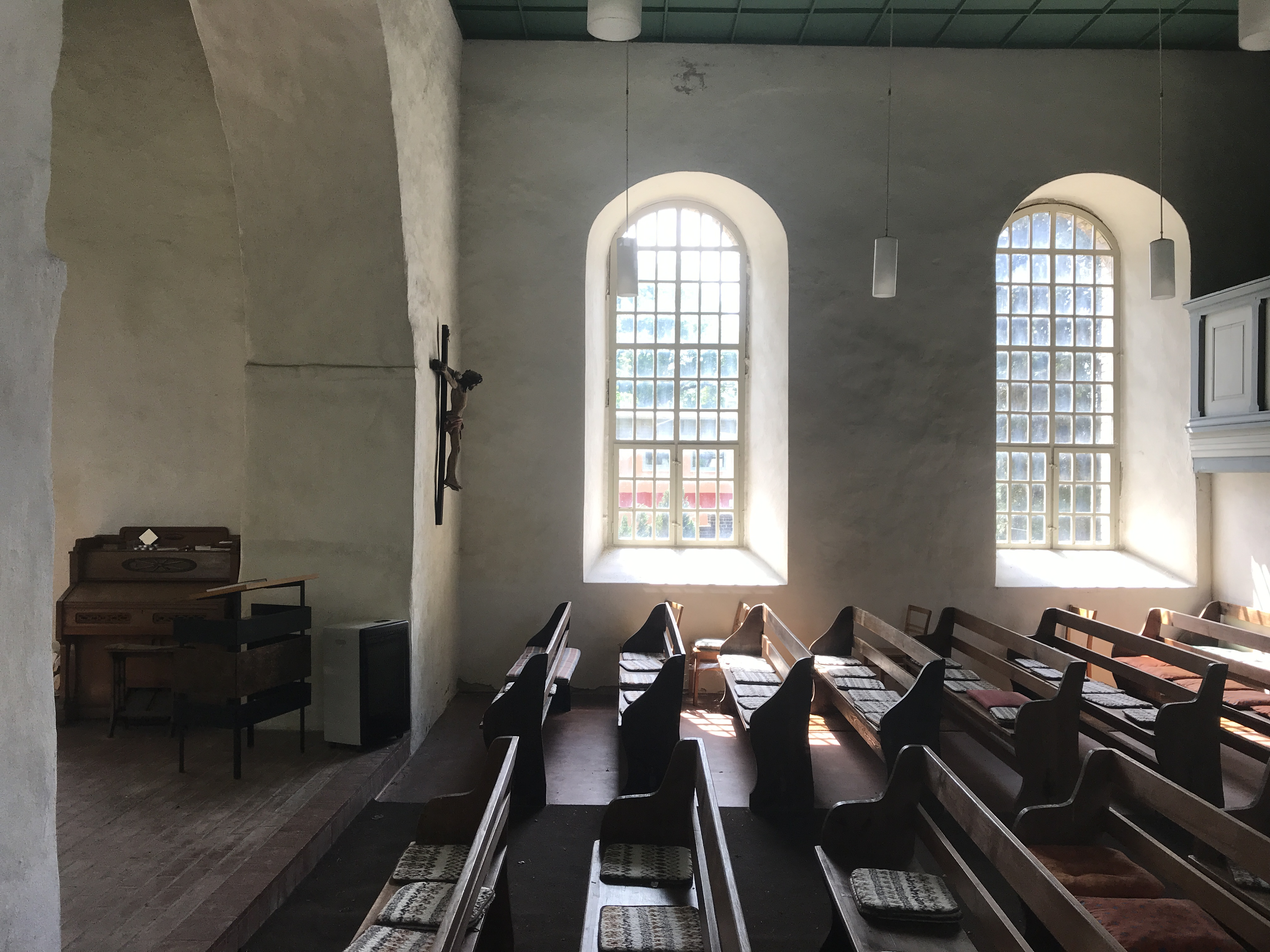 Die Dorfkirche in Hohenstein entstand im 13. Jahrhundert aus Feldsteinen. Im Innern steht unter anderem ein Altarretabel mit einem Kruzifix aus dem 16. Jahrhundert